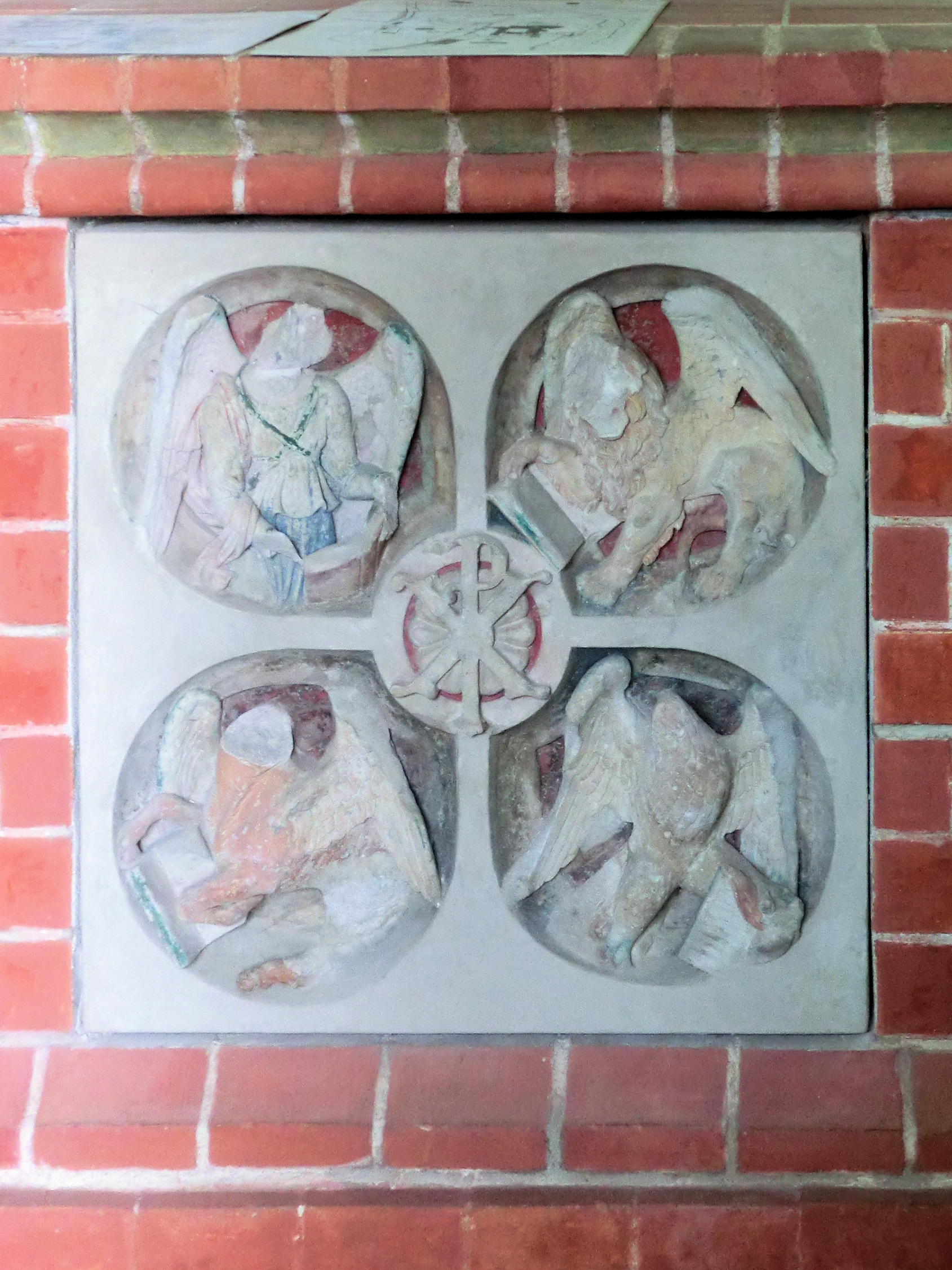 Bad Doberan Münster Beinhaus Relief